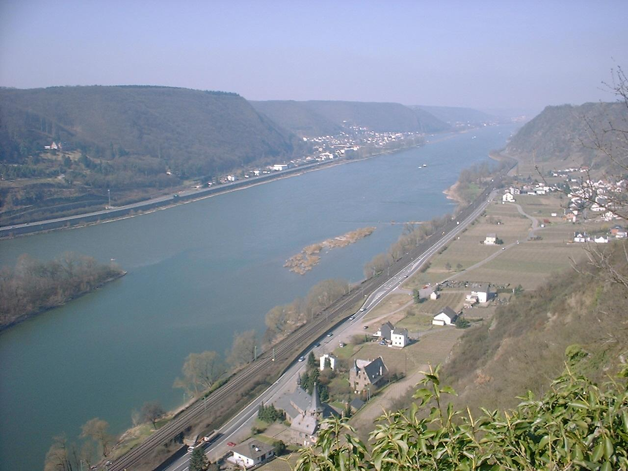 Blick vom Hammerstein (nahe der Ruine) auf Niederhammerstein und über den Rhein auf Brohl-Lützing